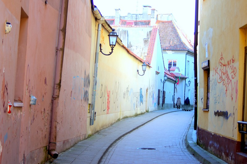 Bernardinų gatvė Vilniuje 2015 metais